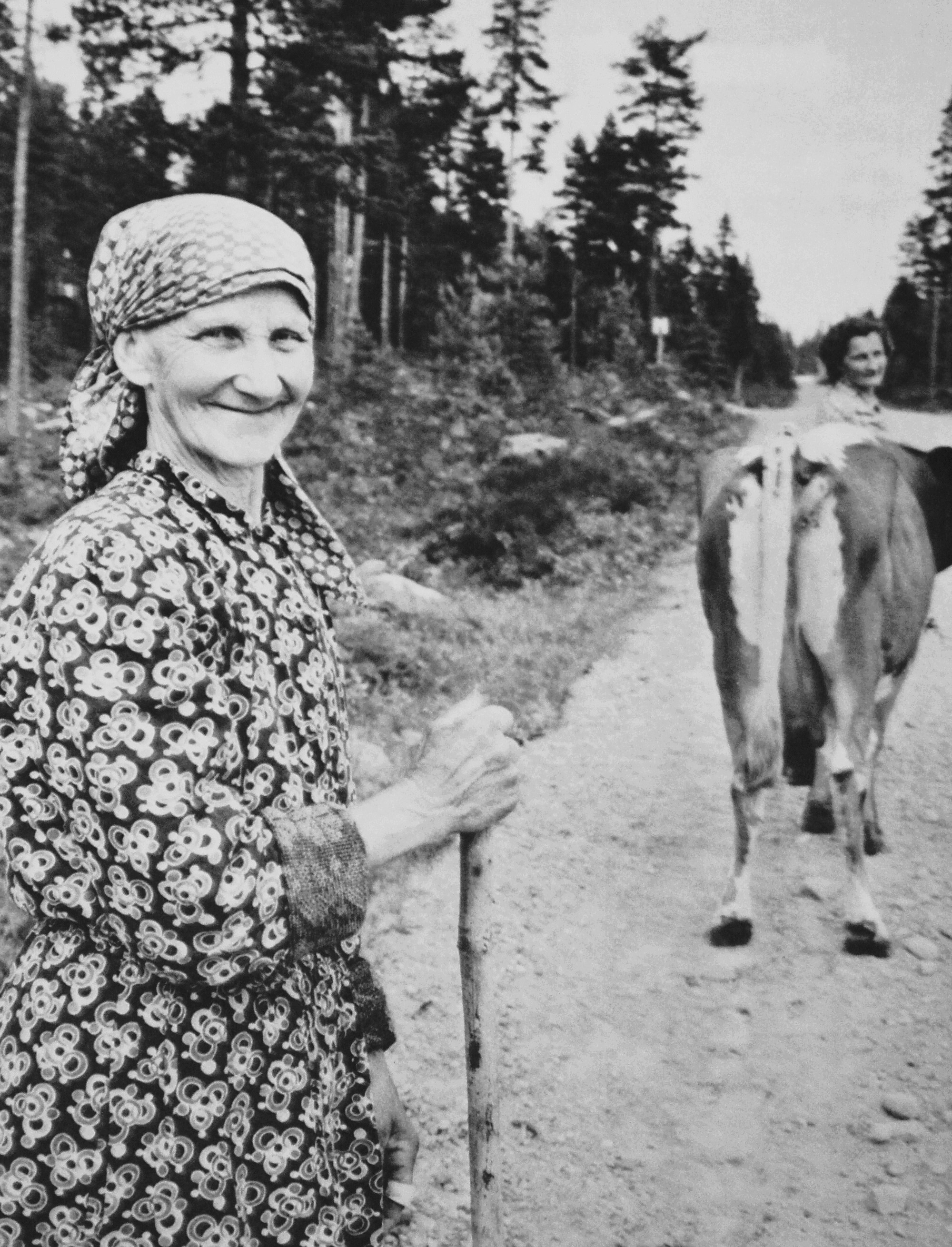 Finskättade kvinnor vallar kor i norra Värmland. Foto/faksimil, Erik Liljeroth 1950-talet.